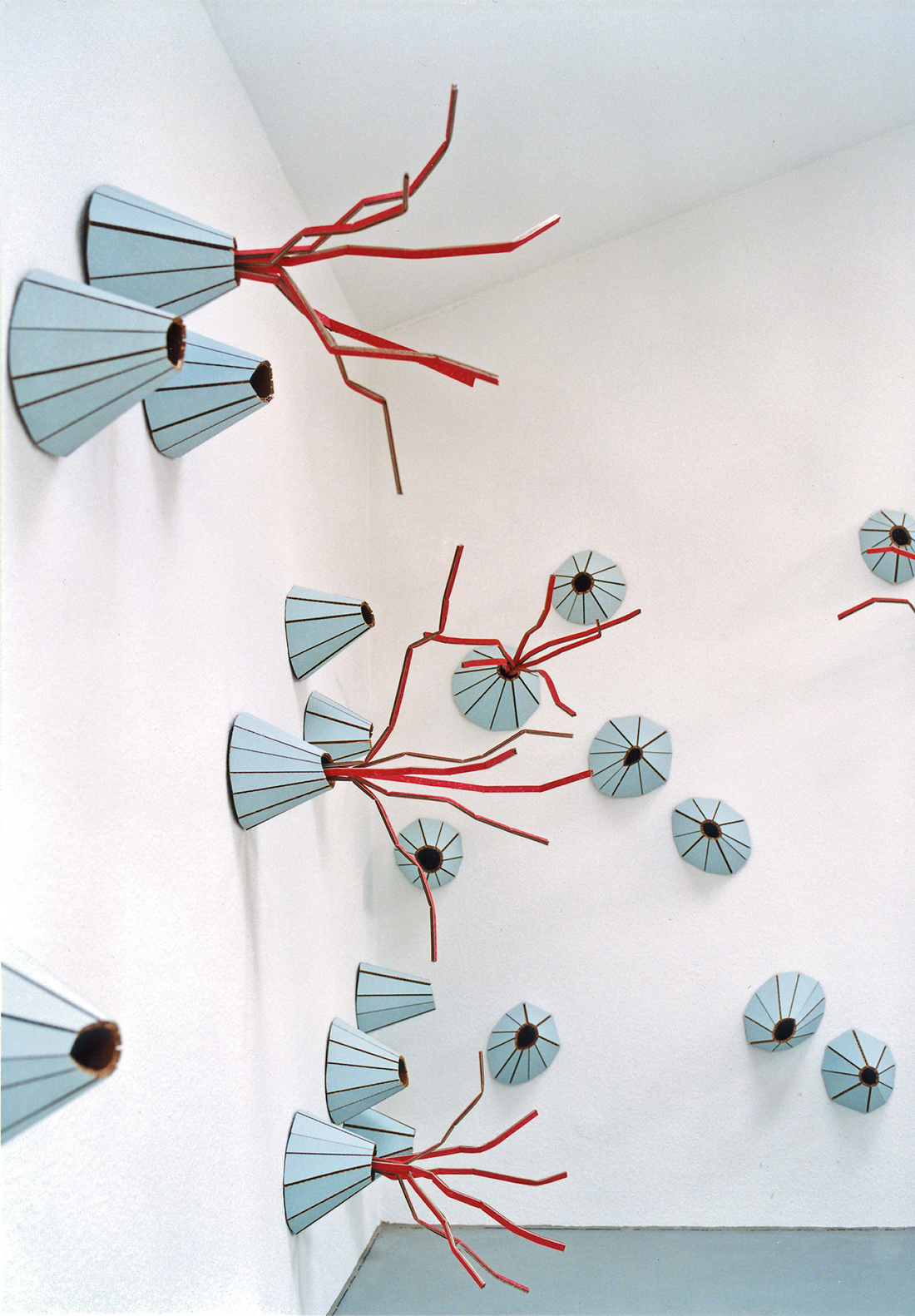 Rauminstallation der Künstlerin Barbara Isabella Bauer-Heusler